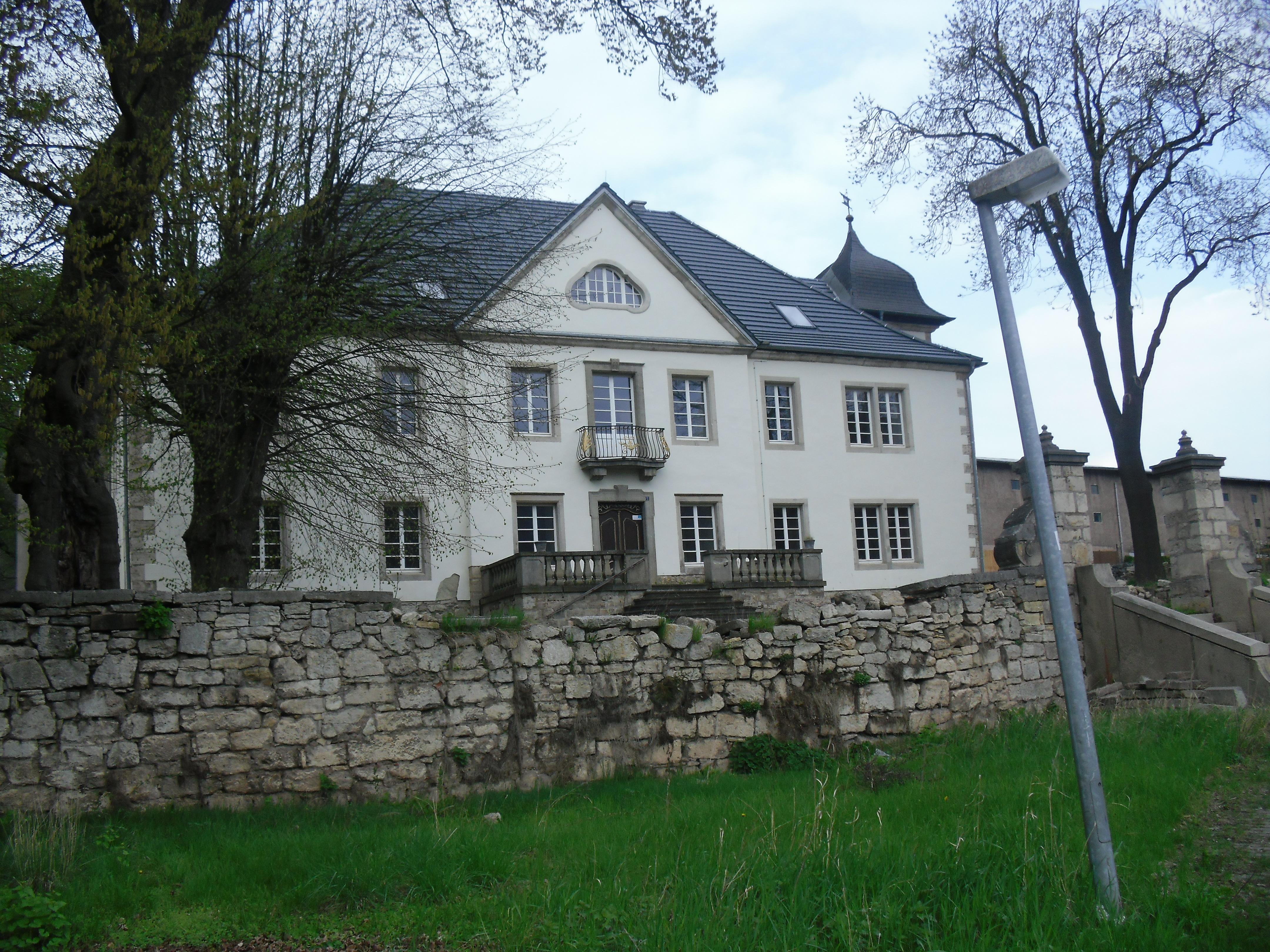 Friedensstraße 5, D-37339 Buhla, Ersterwähnung 1238, neu erbaut 1592